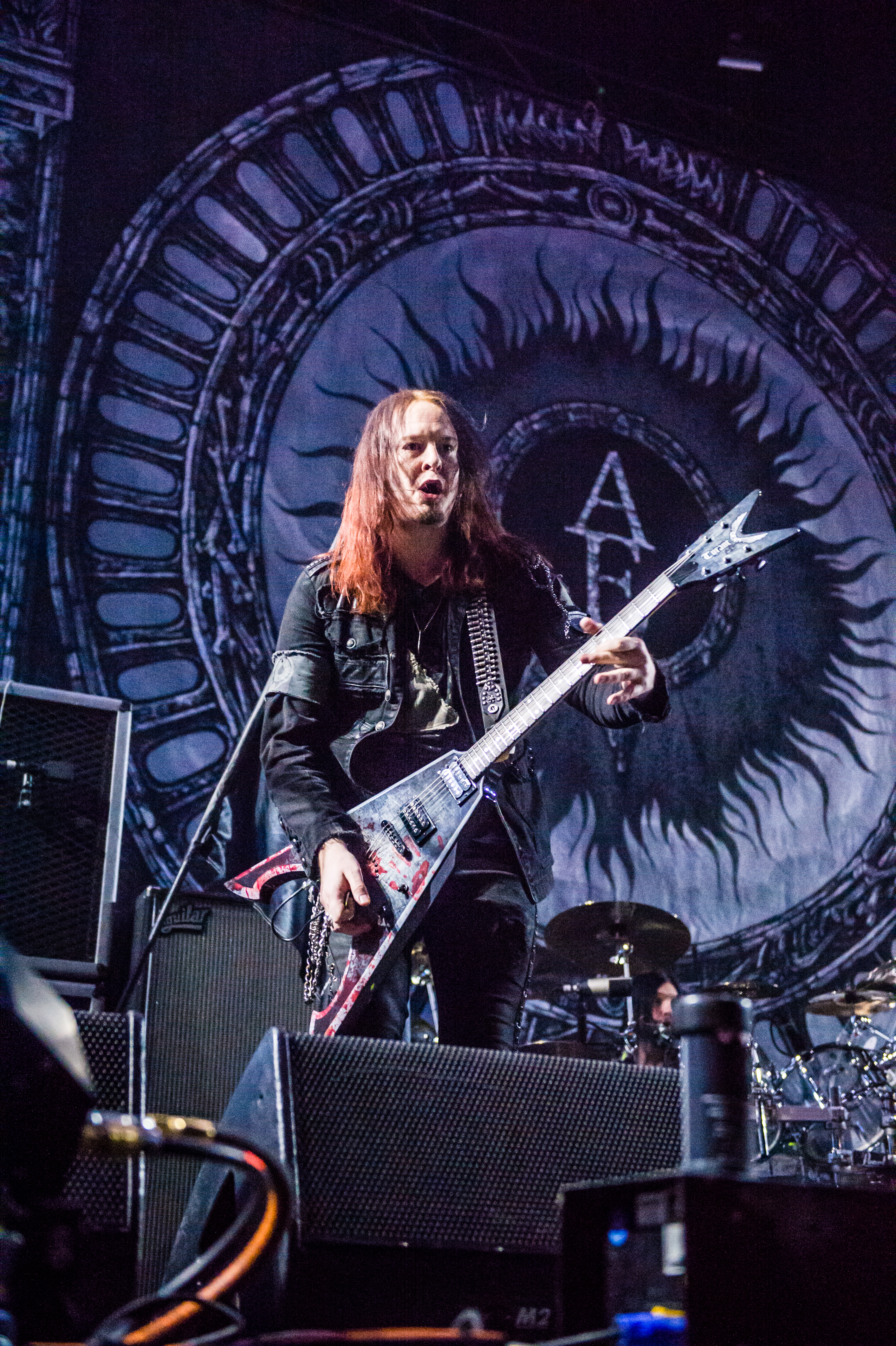 'Arch Enemy - Support für Nightwish Endless forms most beautiful Tour 2015 Oberhausen'